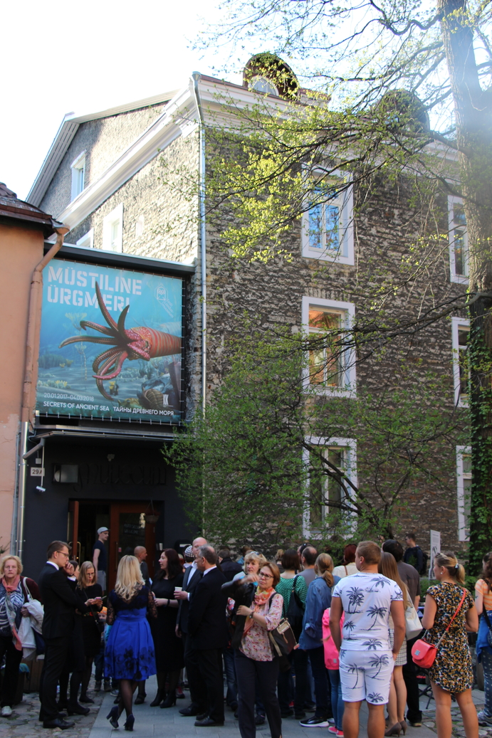 2017. aasta Muuseumiöö Eesti Loodusmuuseumis tõi majja tuhandeid külastajaid.